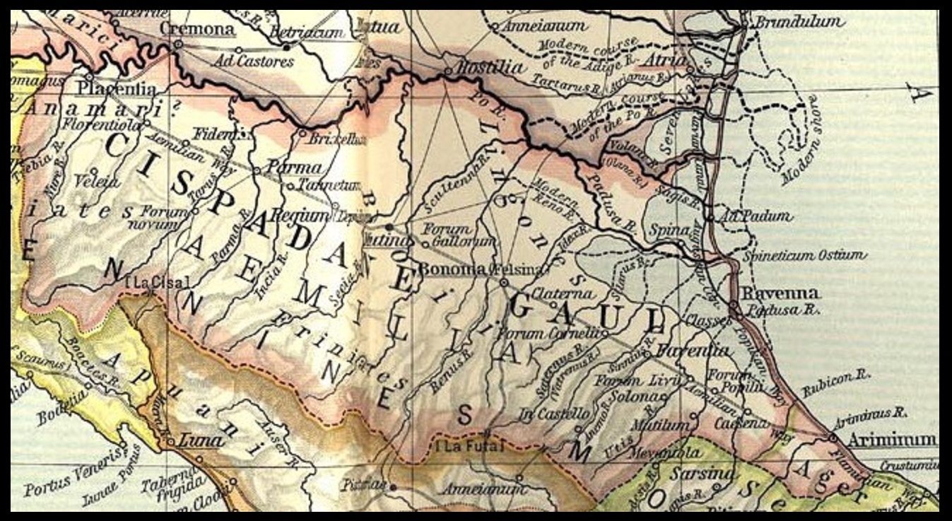 La Regio VIII Aemilia al tempo dell'imperatore Ottaviano Augusto